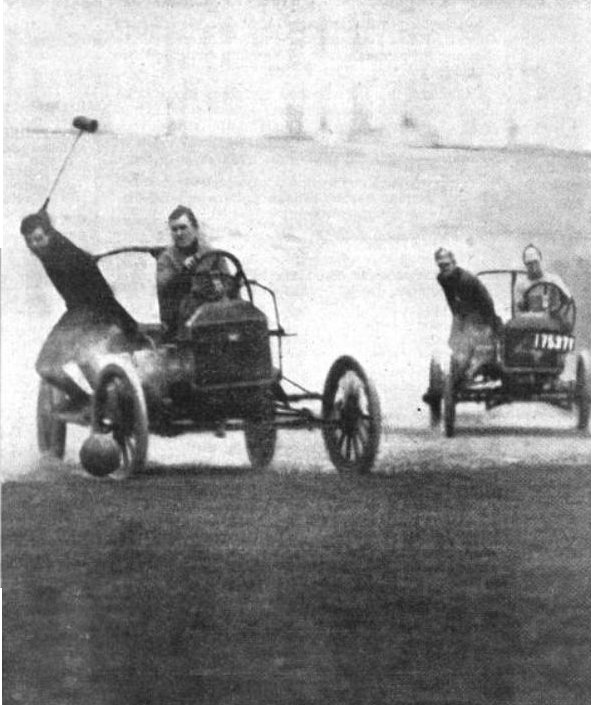 Auto polo from Collier's Automobile Supplement, c. 1912.